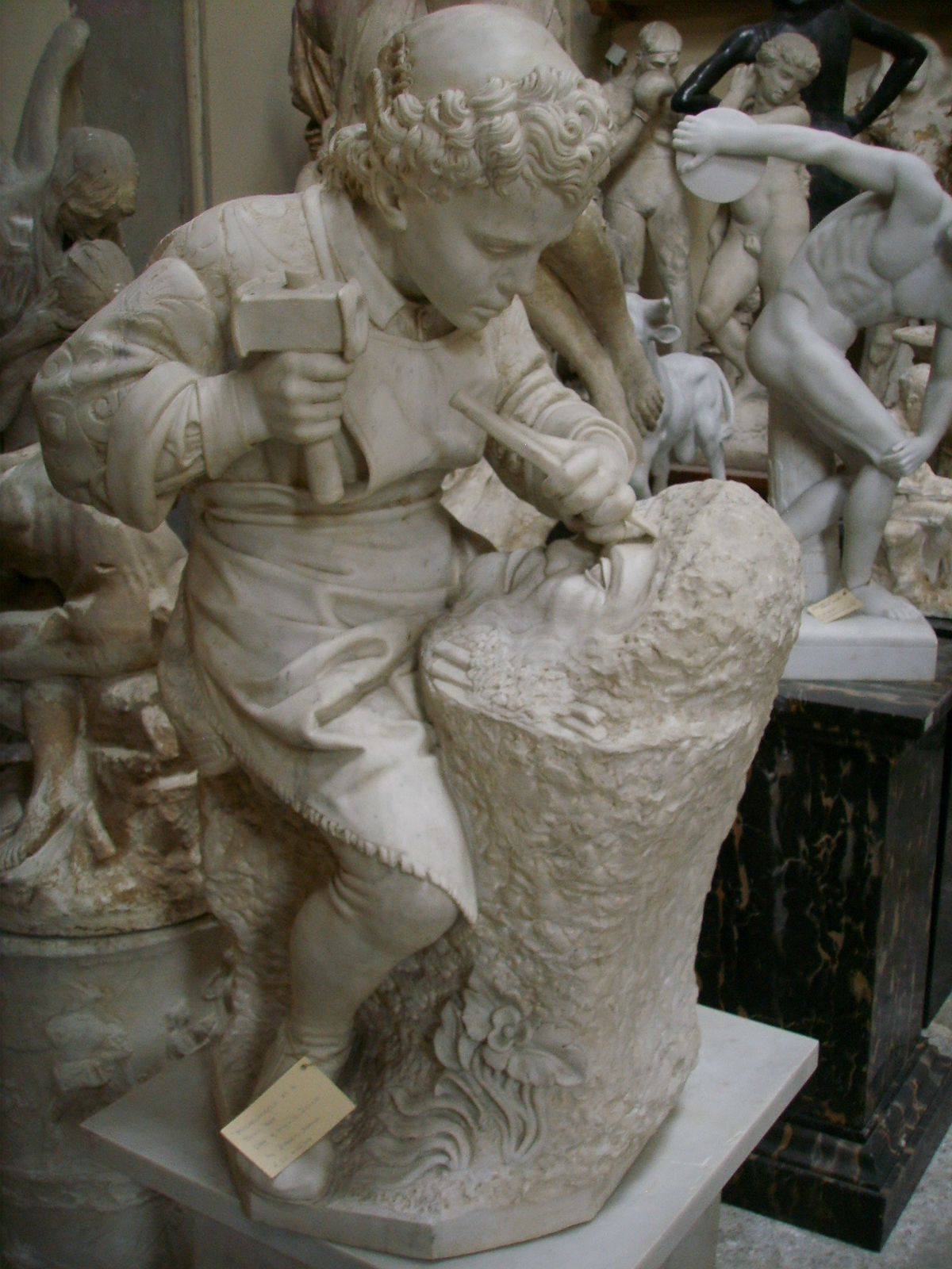 Ex-Monastero dell'Arcangelo Raffaello, oggi studio romanelli